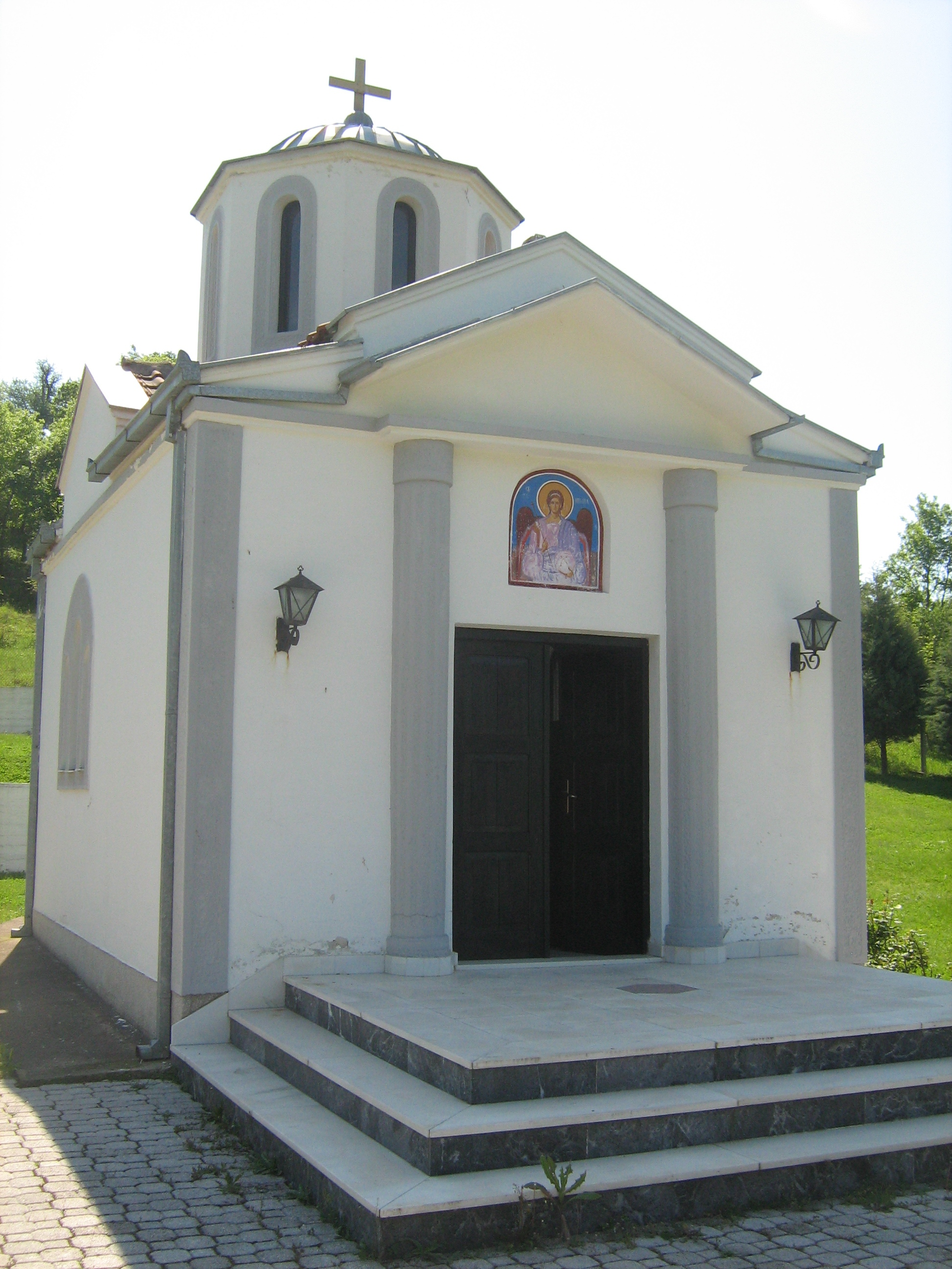 Црква во манастирот Св. Архангел Михаил во Теово, Република Македонија